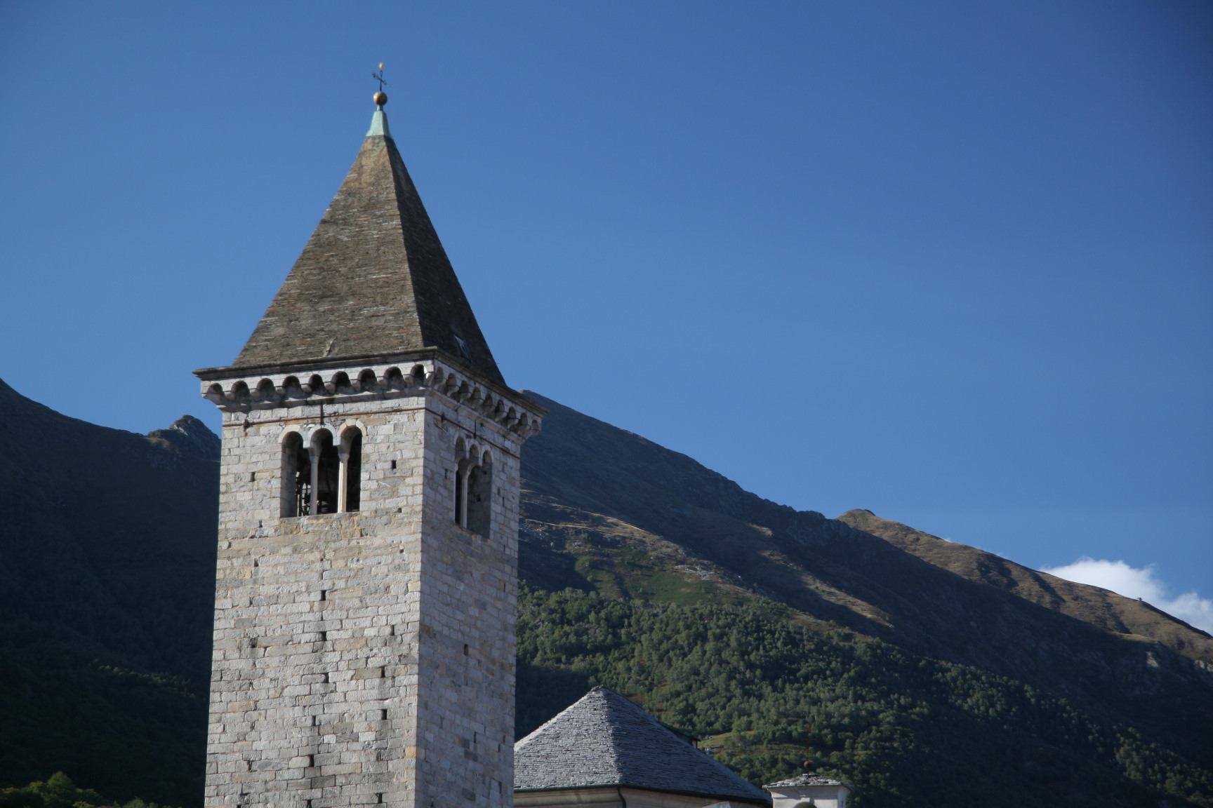 Cannobio, la parte superiore del campanile della chiesa di San Vittore.